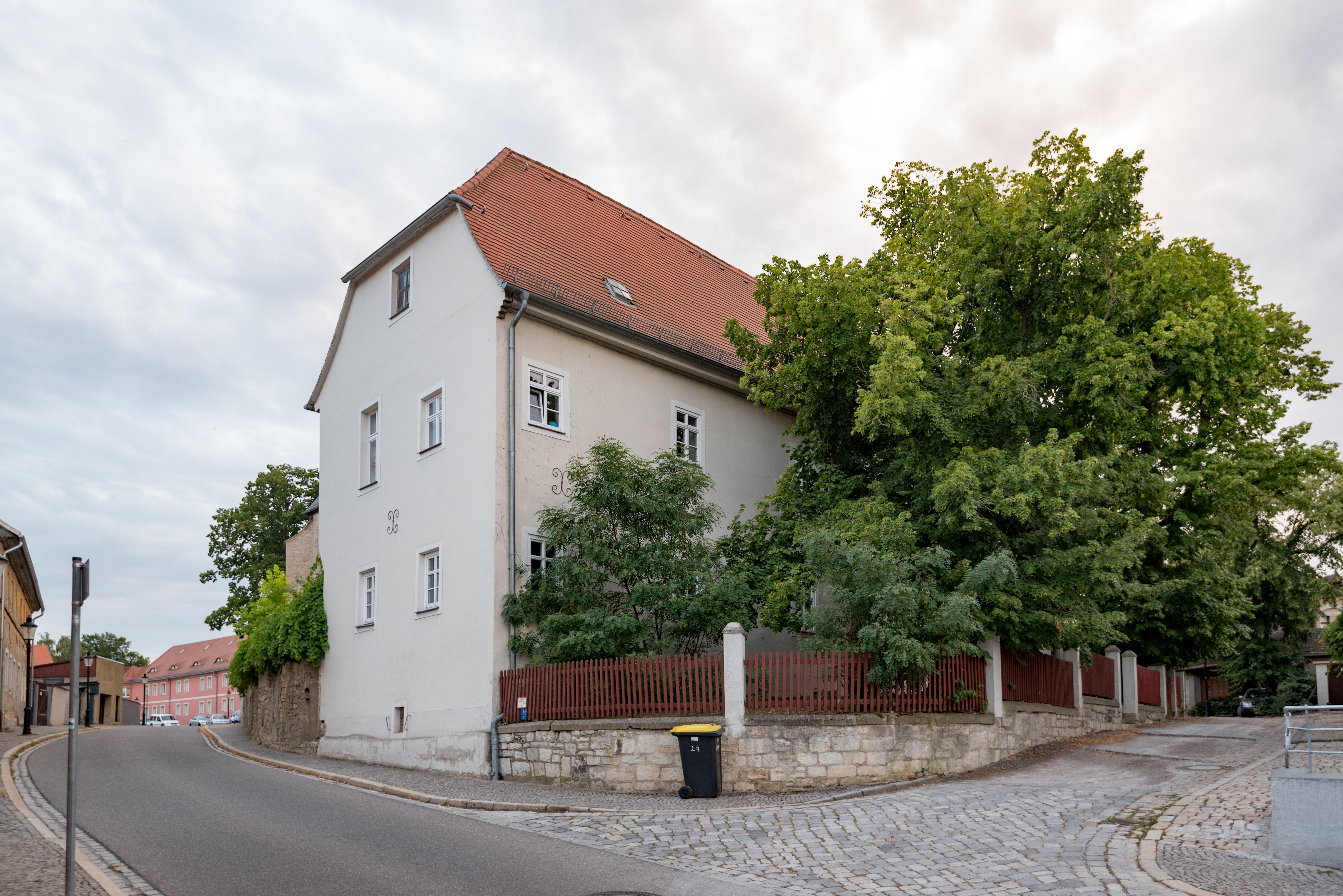 Naumburg (Saale), Moritzberg 31